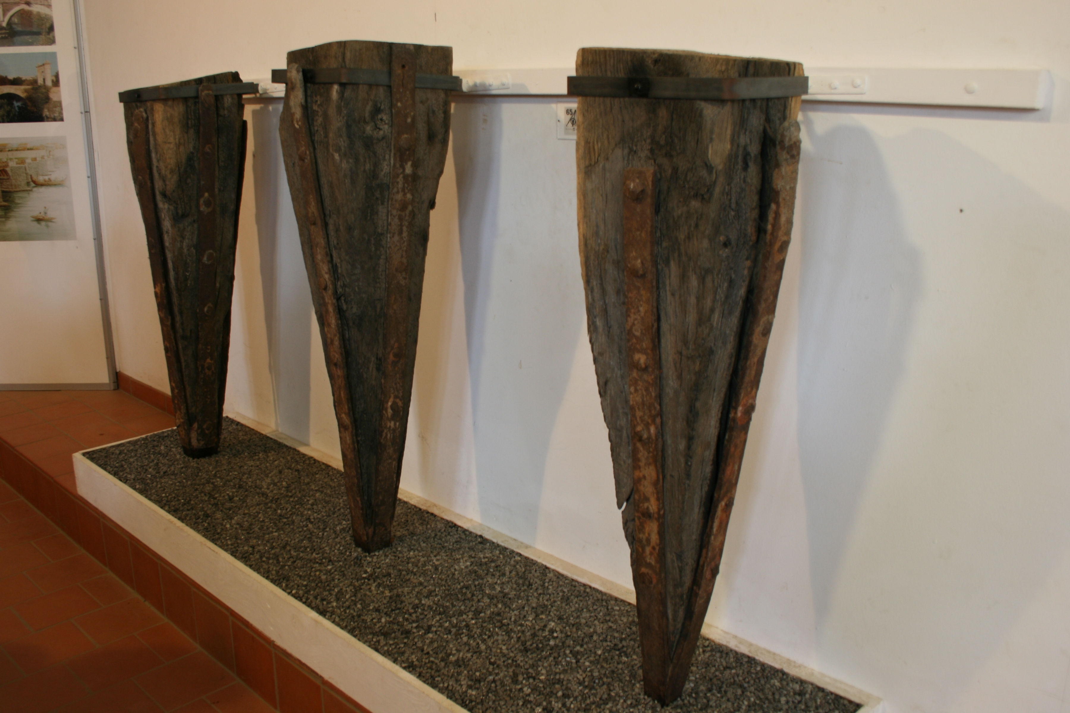 Römische Pfahlschuhe von der Mainbrücke beim Kastell Großkrotzenburg im Saalburgmuseum.